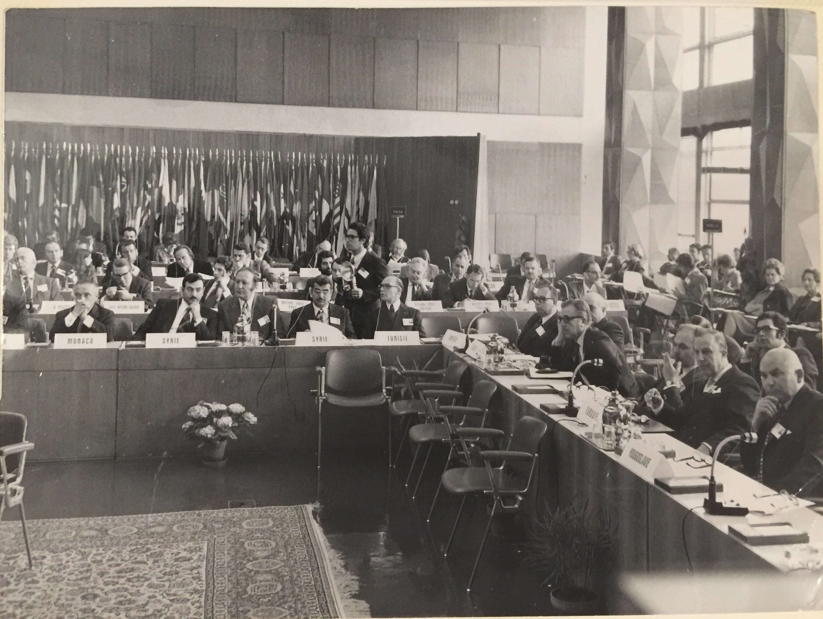 في مؤتمر روما للمياه